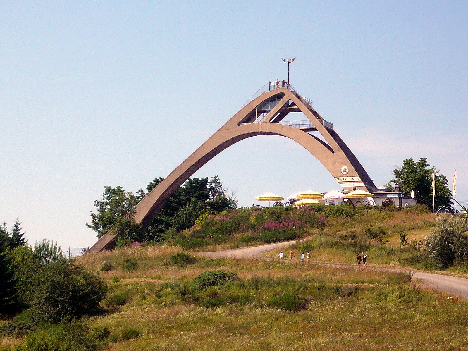 St.-Georg-Schanze, Anlaufturm